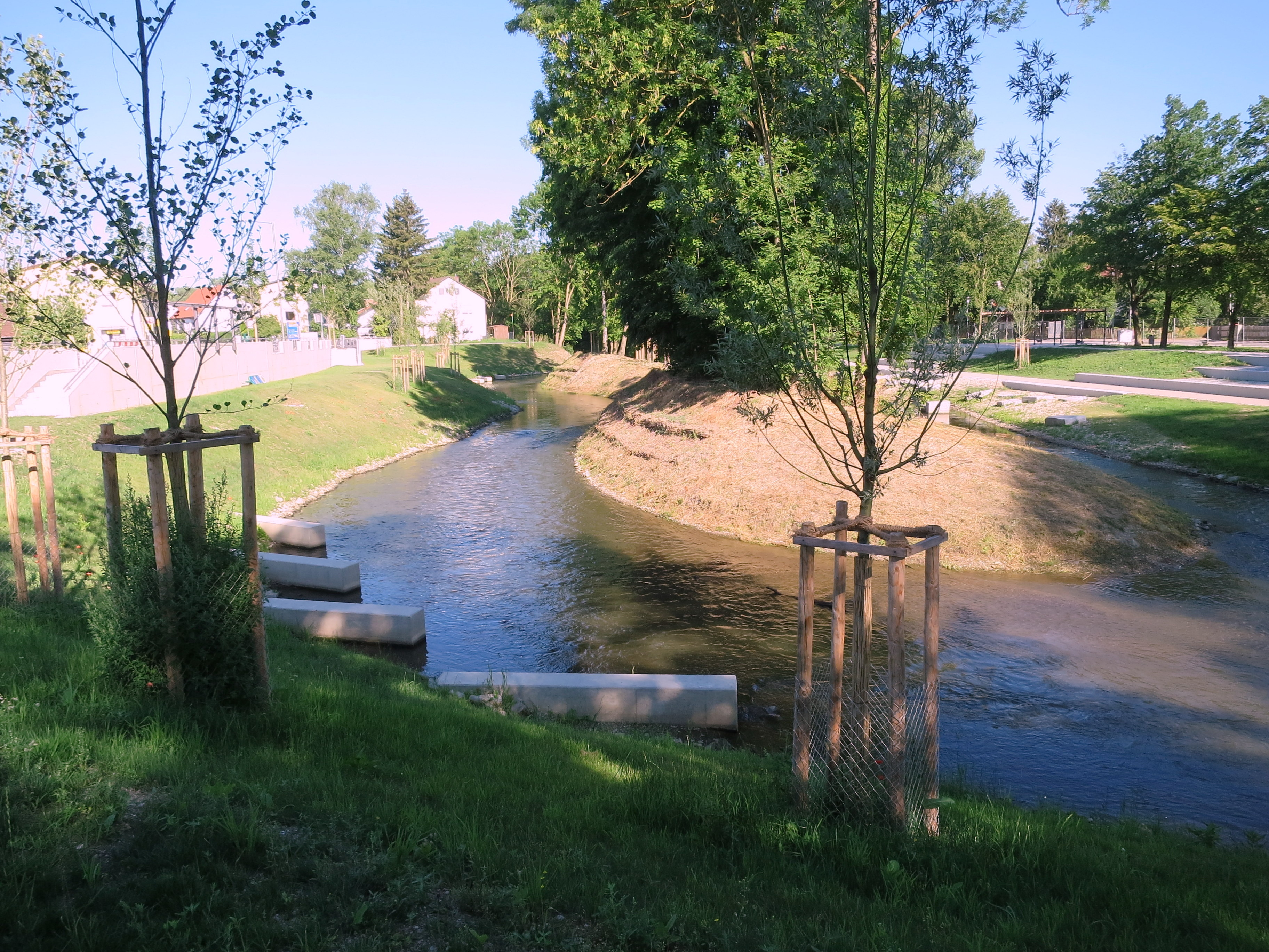 Die neue Glonnanlage, die im Frühjahr 2017 fertig wurde